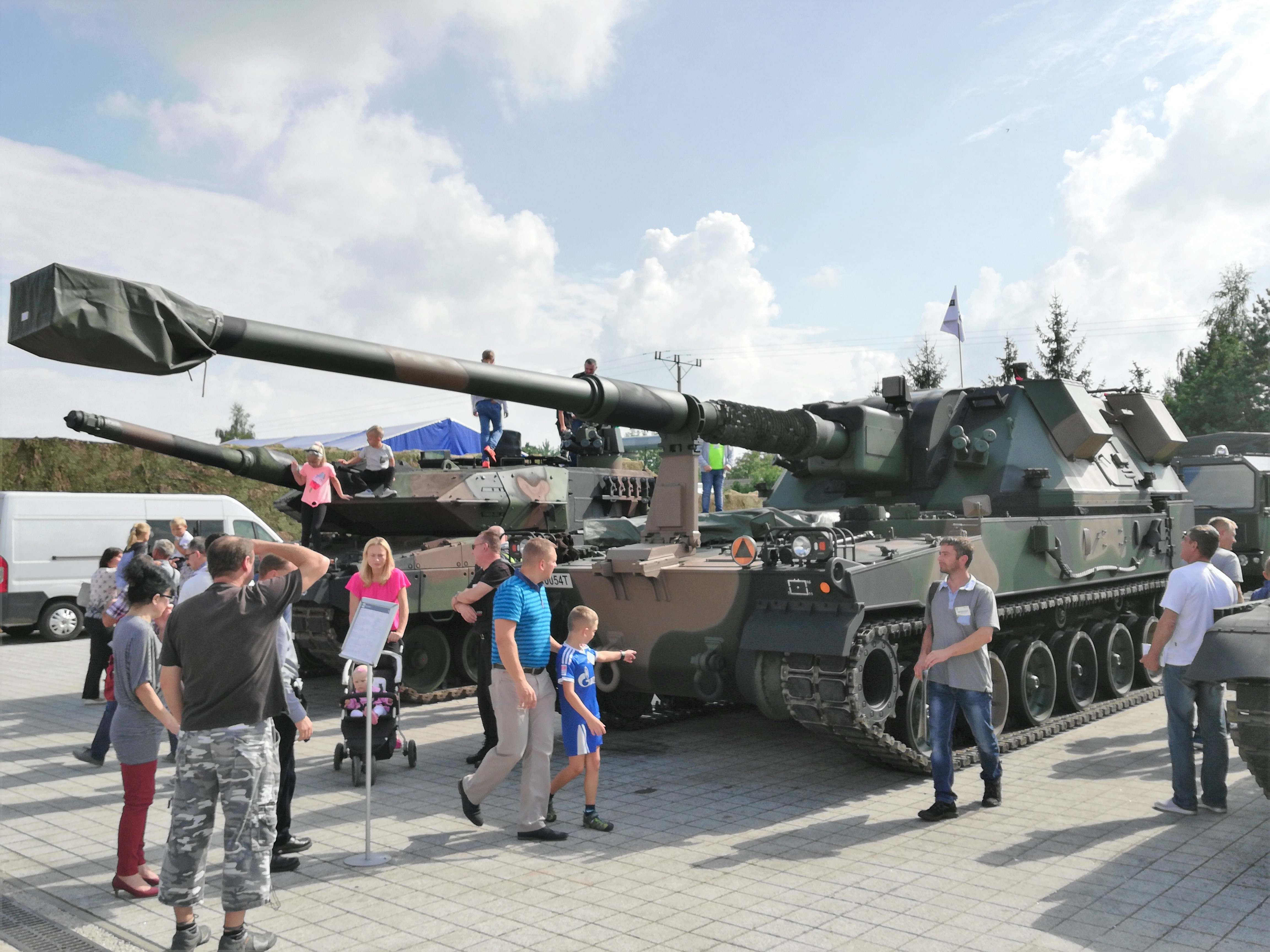 Armatohaubica KRAB 155mm - Targi Kielce - Międzynarodowy Salon Przemysłu Obronnego 2018